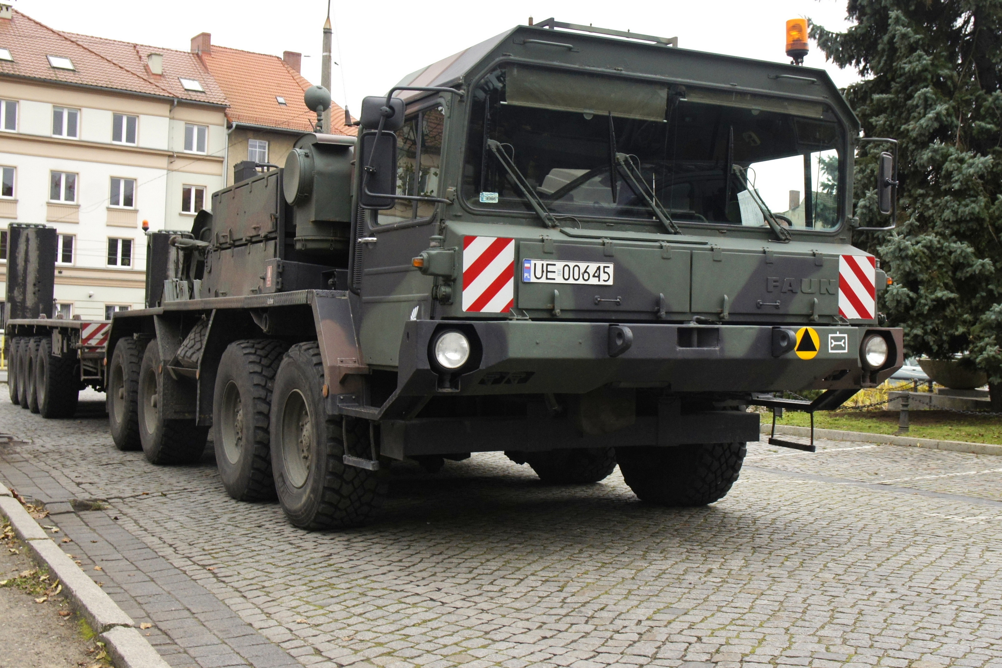 Zestaw ewakuacji ciężkiego sprzętu Faun SLT 50-2 Elefant z naczepą niskopodwoziową Kassbohrer z 34 Brygady Kawalerii Pancernej (transporter czołgów podstawowych Leopardów 2 A5)